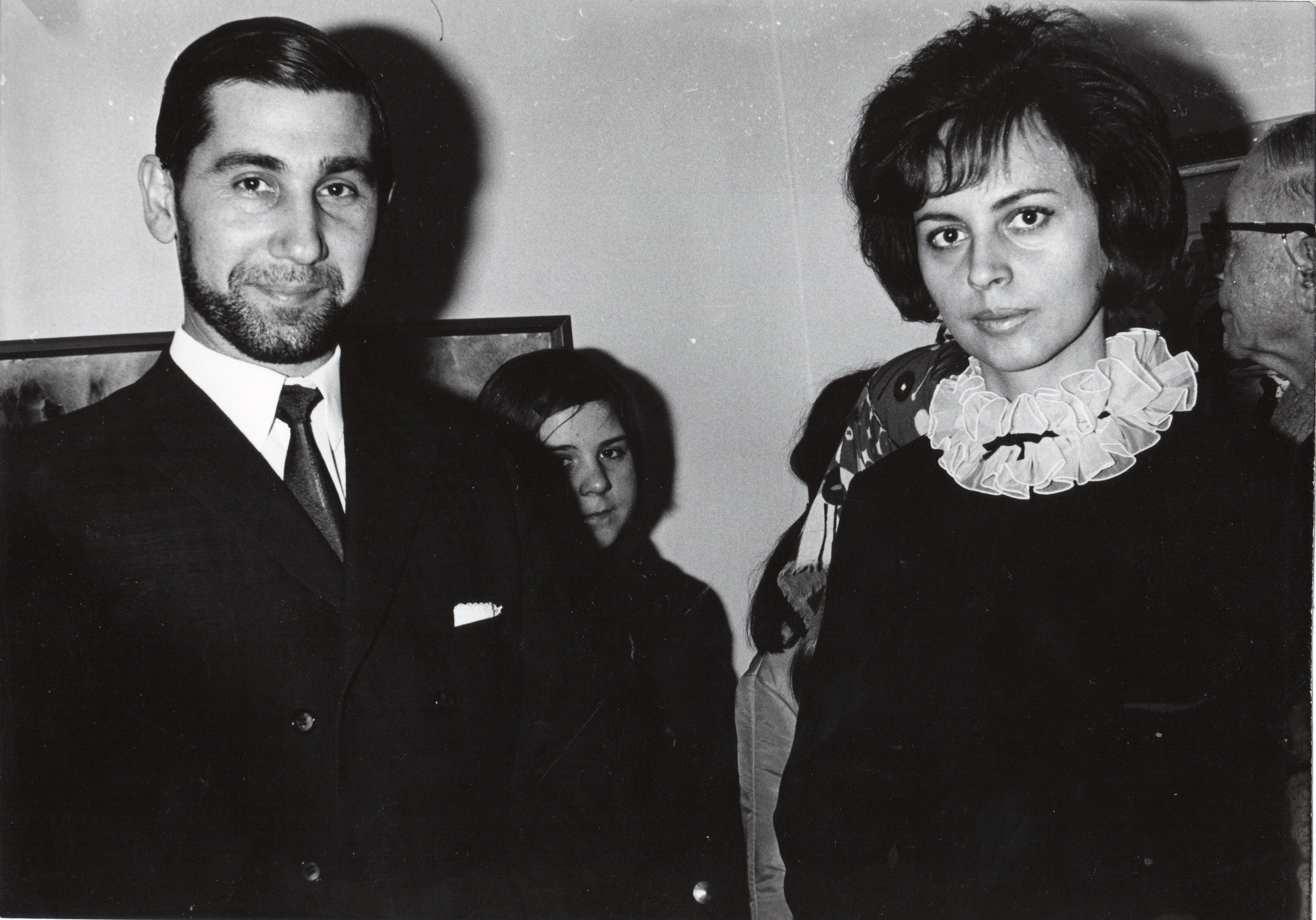 Milan Beránek s manželkou Věrou Navrátilovou